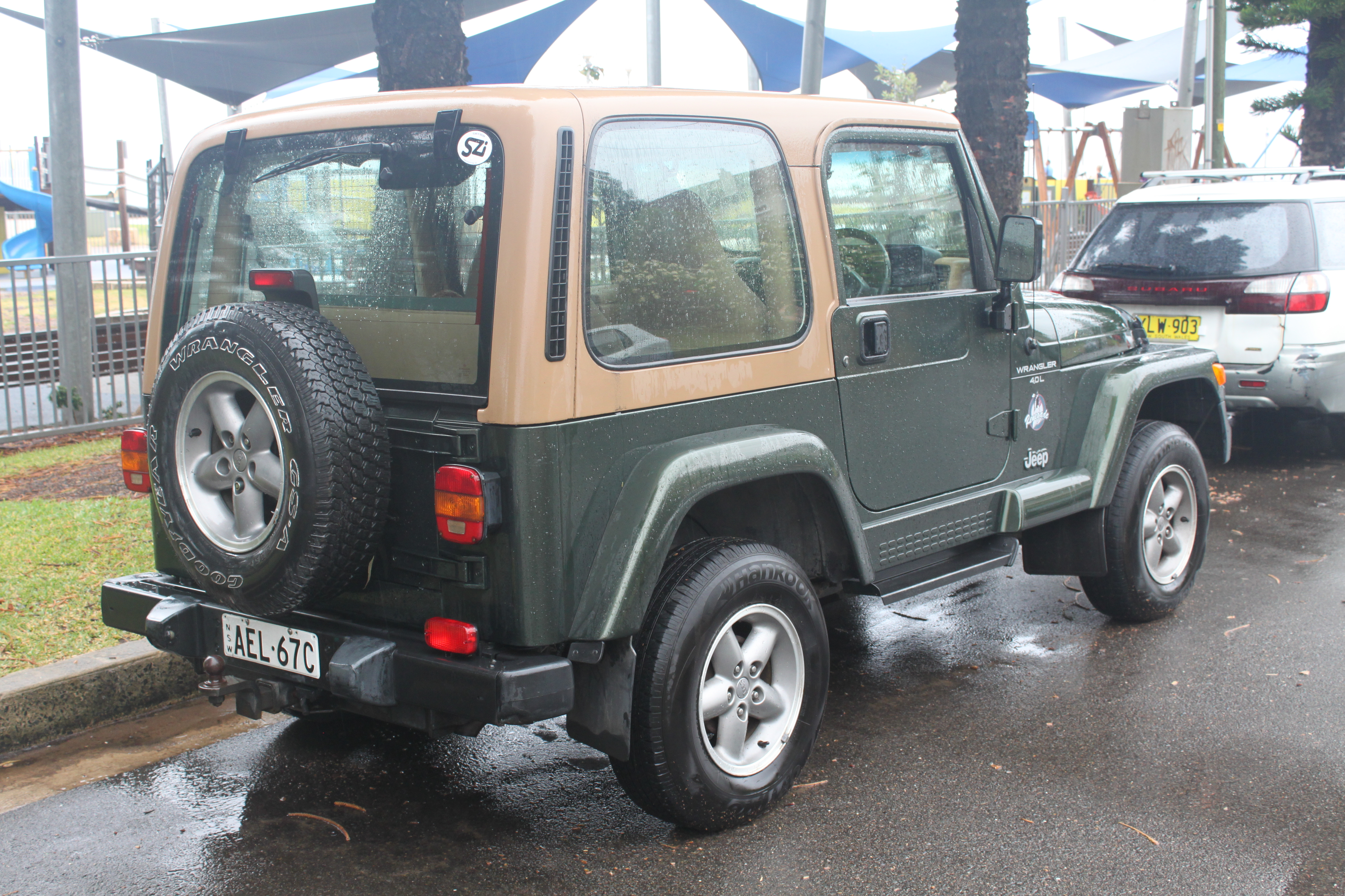 Jeep Wrangler TJ Renegade